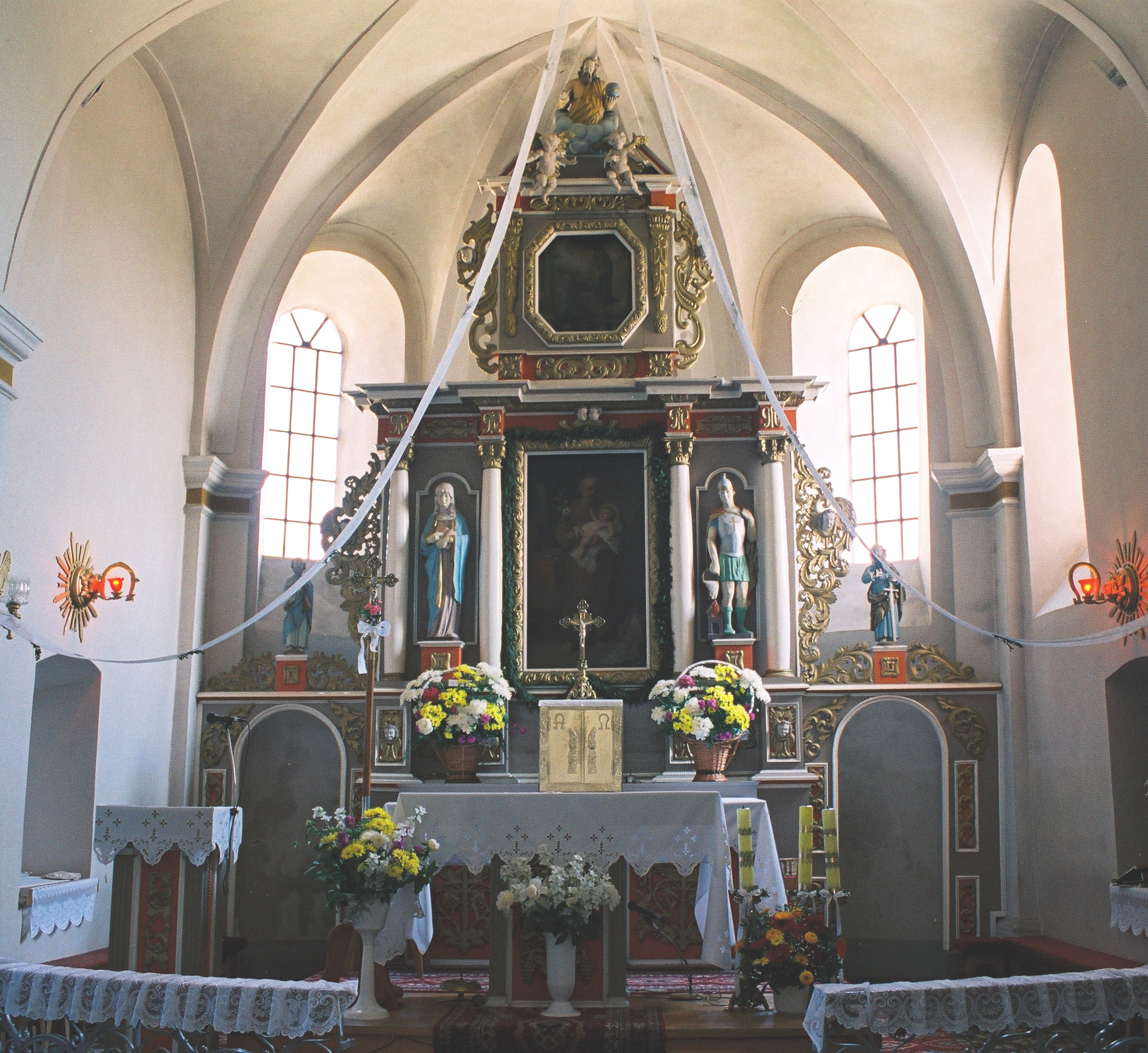 ołtarz w kościele w Sadowiu, gmina Koszęcin, powiat lubliniecki, województwo śląskie